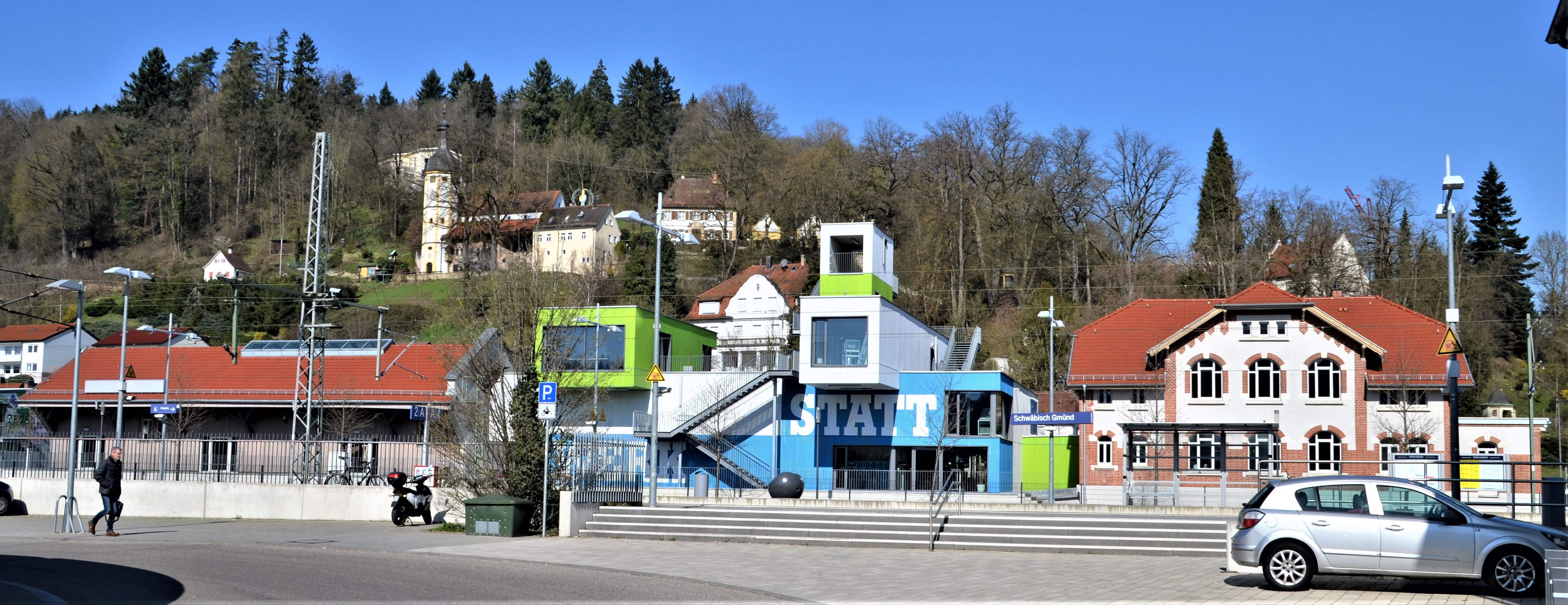 Ehemaliger Güterbahnhof Schwäbisch Gmünd, oberhalb befindet sich die Wallfahrtstätte St. Salvator